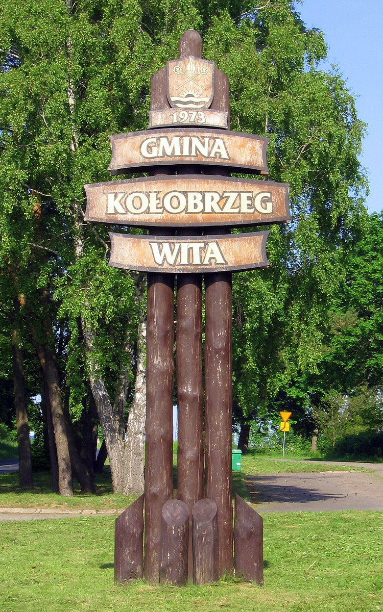 Witacz gminy Kołobrzeg przy drodze wojewódzkiej nr 102